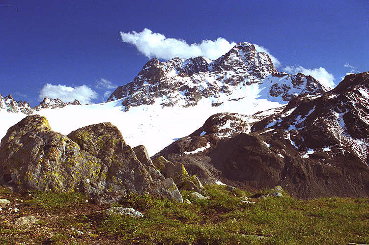 Piz Kesch (3418 m), Albula Alpen, selbst fotografiert, GNU-FDL